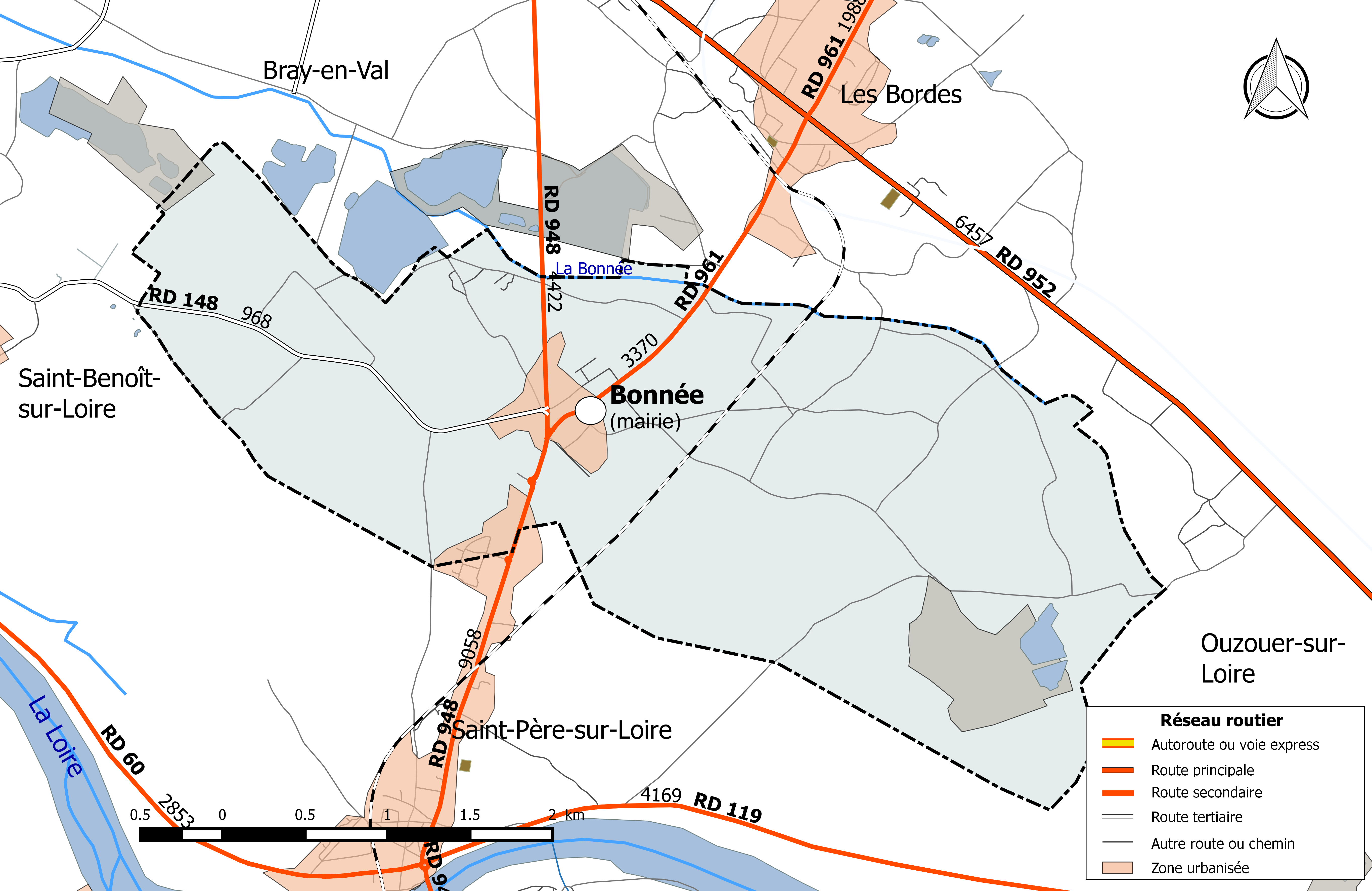 Carte du réseau routier de la commune de Bonnée.